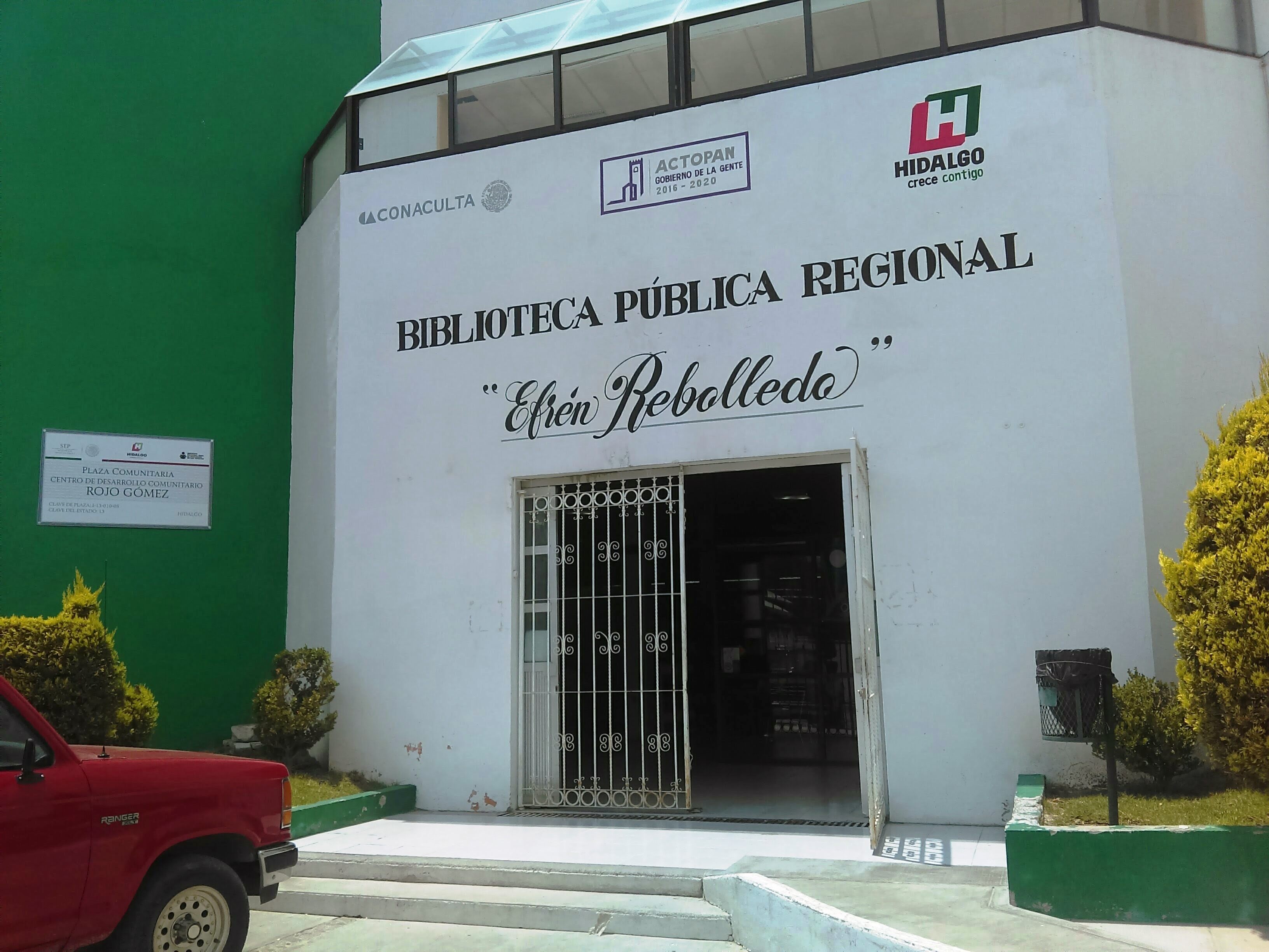 Biblioteca de Actopan, Hidalgo, México